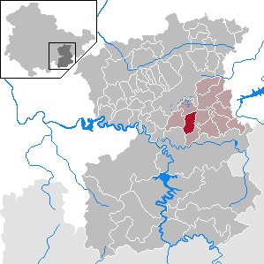 Neundorf (bei Schleiz) in Thuringia - Saale-Orla-Kreis